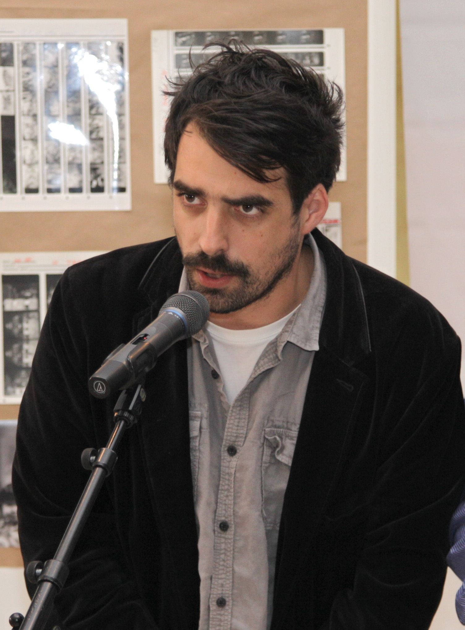 Nikola Škorić